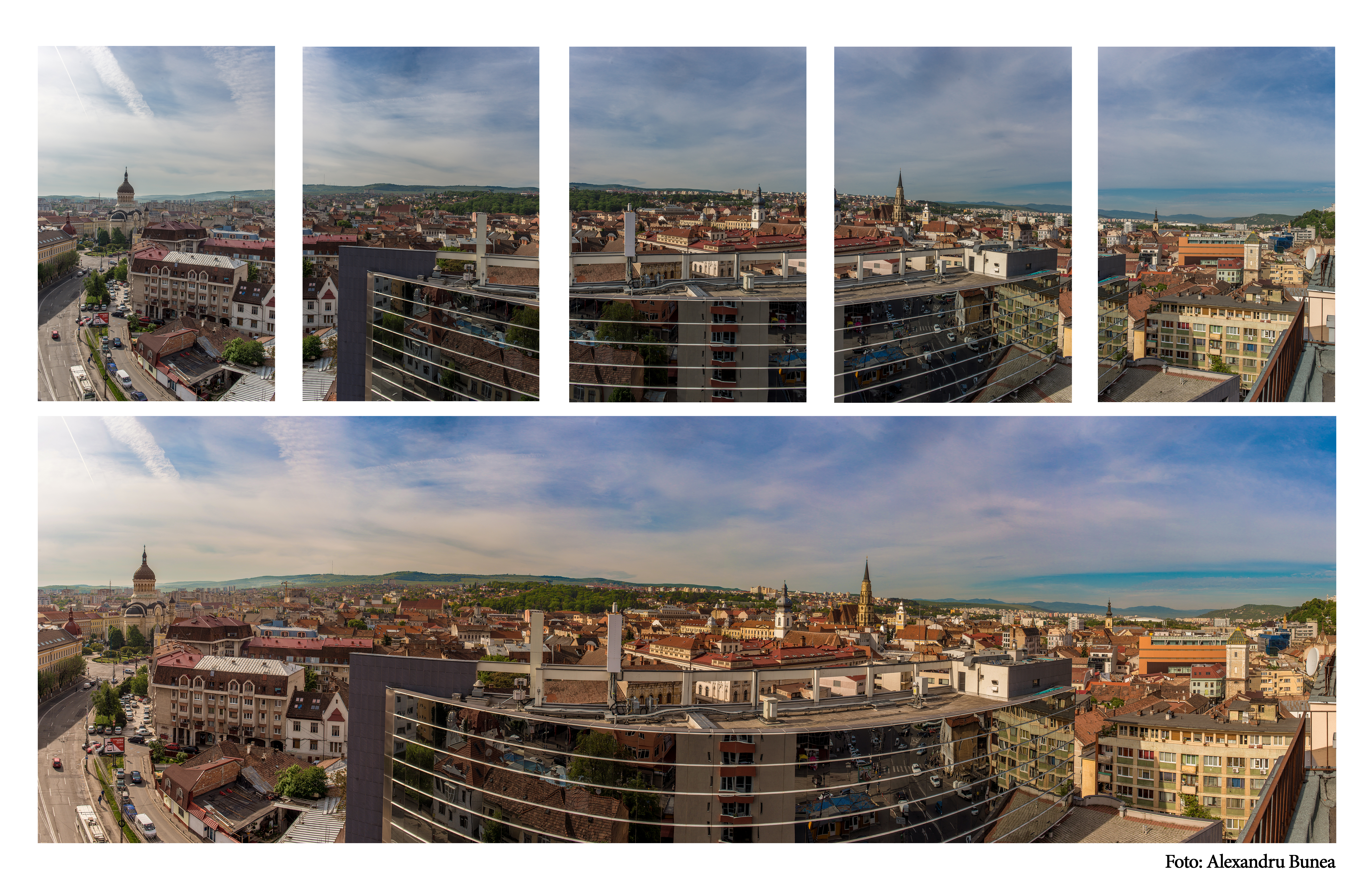 Exemplu de panorama realizata din mai multe cadre lipite ulterior in procesare.